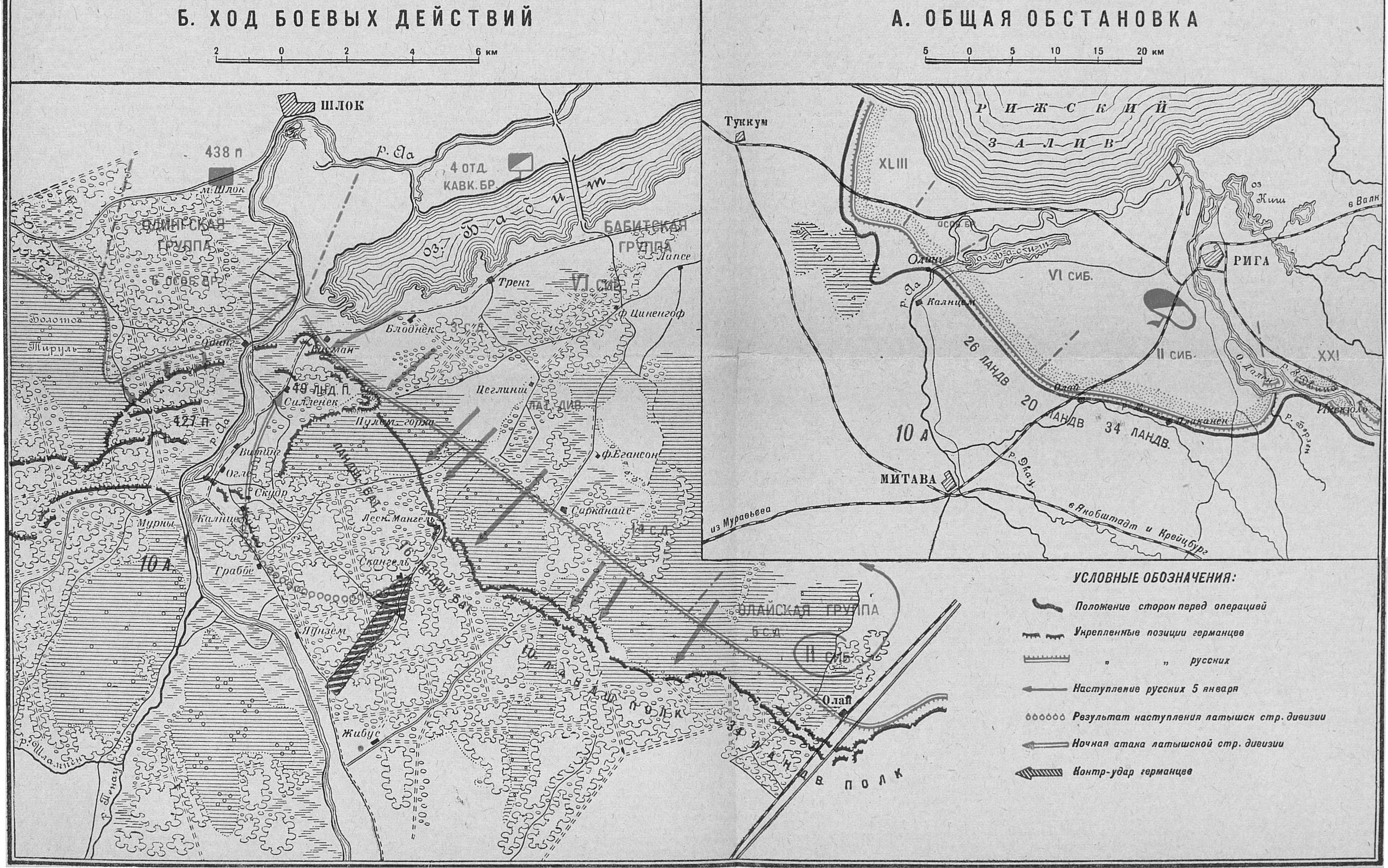 Лист №51. Кампания 1917 г. Русский театр. Митавская операция в январе.